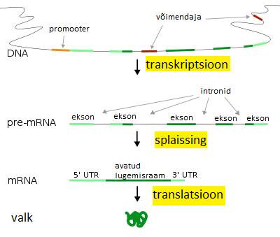 Kodeeriv ala